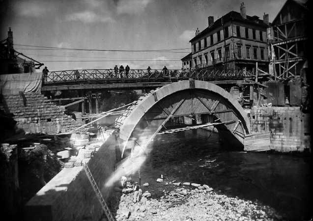 Reconstruction du pont démoli en 1940 à Pont-de-Beauvoisin, France